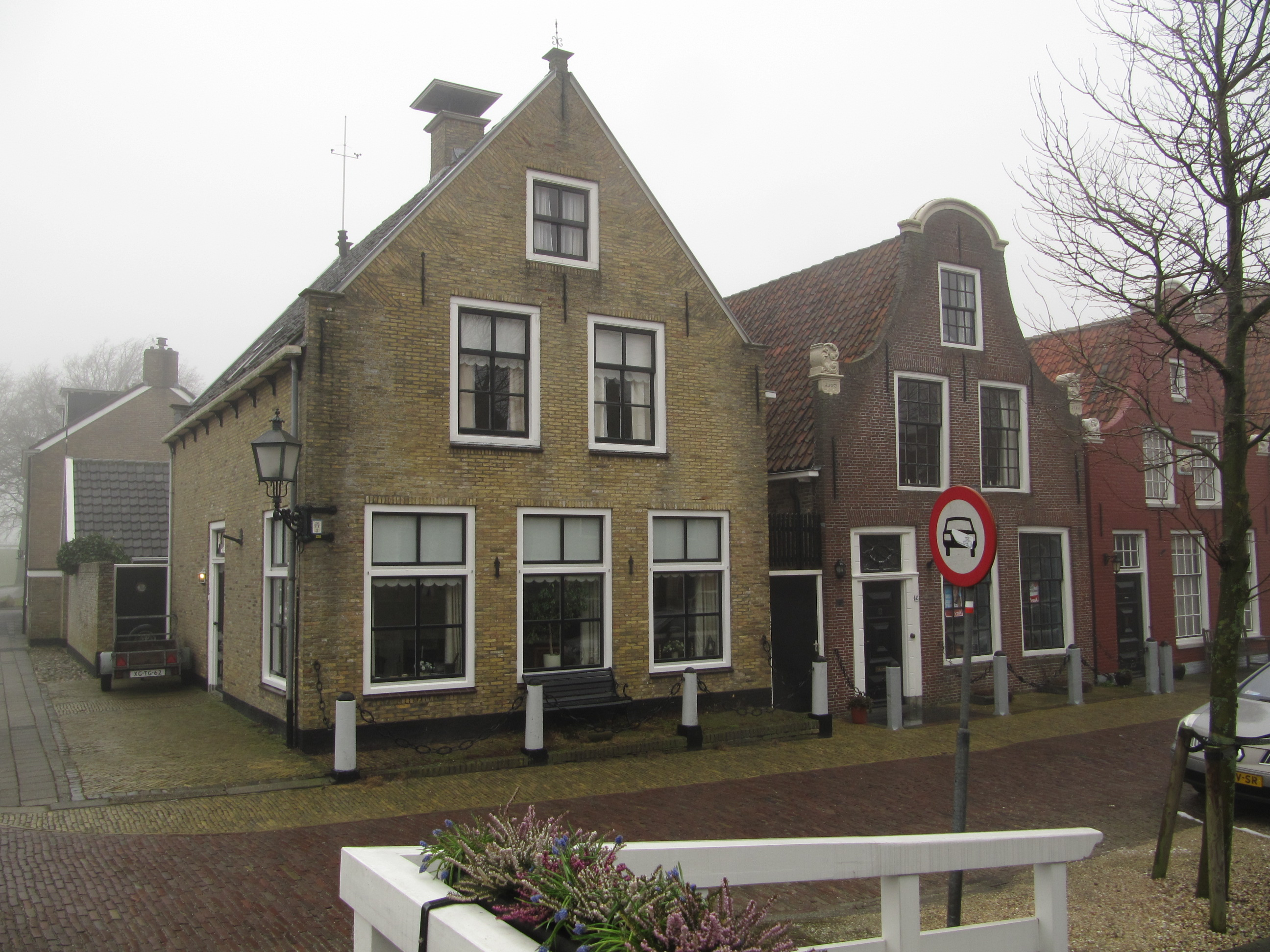 RM20750 Harlingen - Zoutsloot 43.jpg